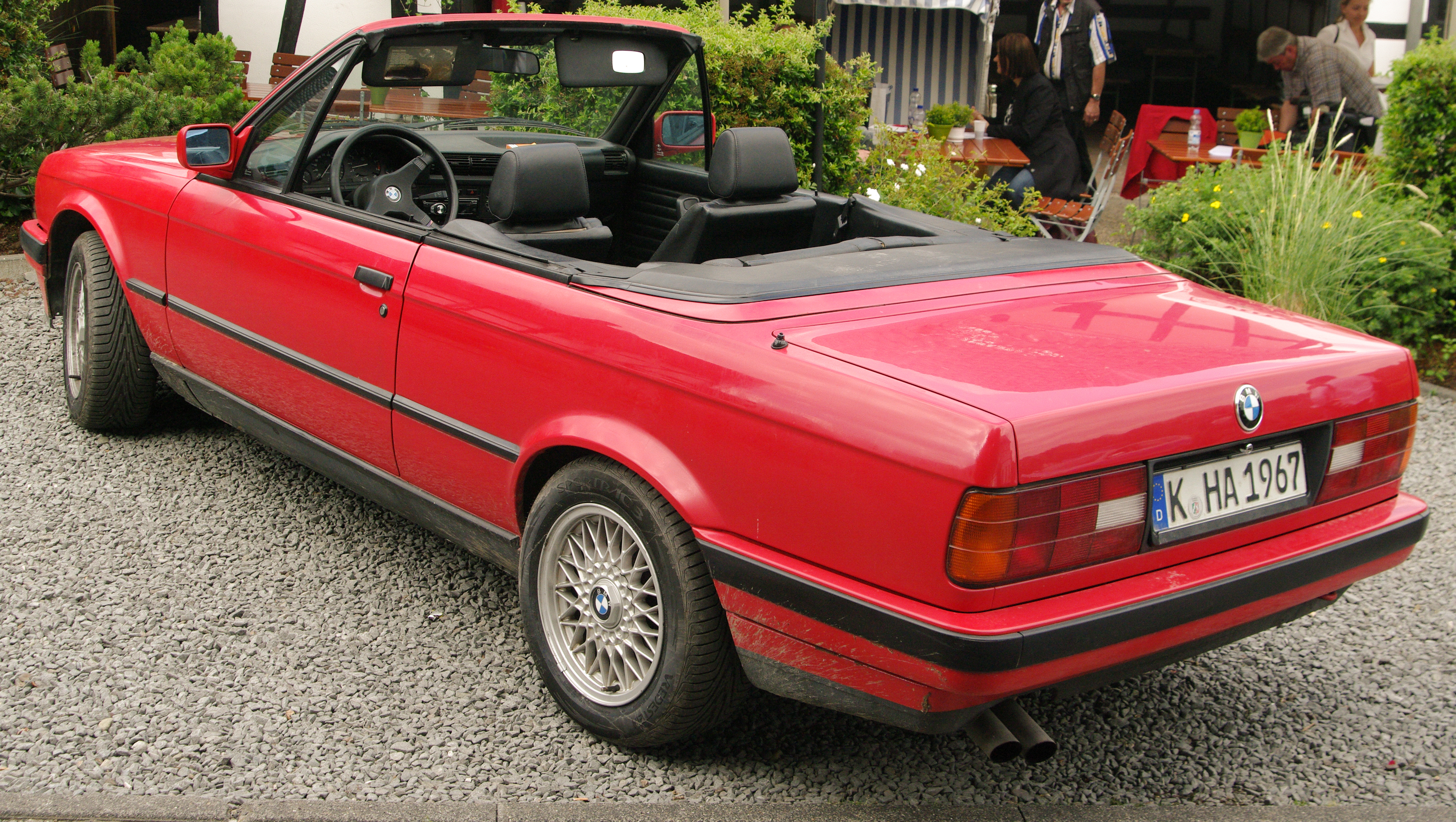 Settermin ARD Serie "Mord mit Aussicht" am 13-Juni 2014 in Neunkirchen-Seelscheid